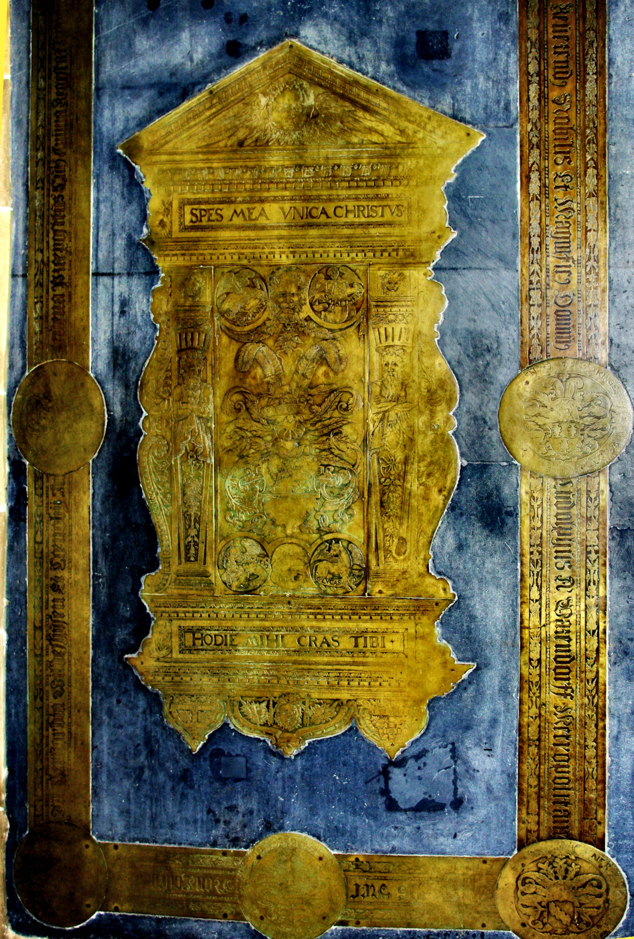 Grabplatte des Ludolf v. Varendorffs im St.-Petri-Dom zu Bremen.